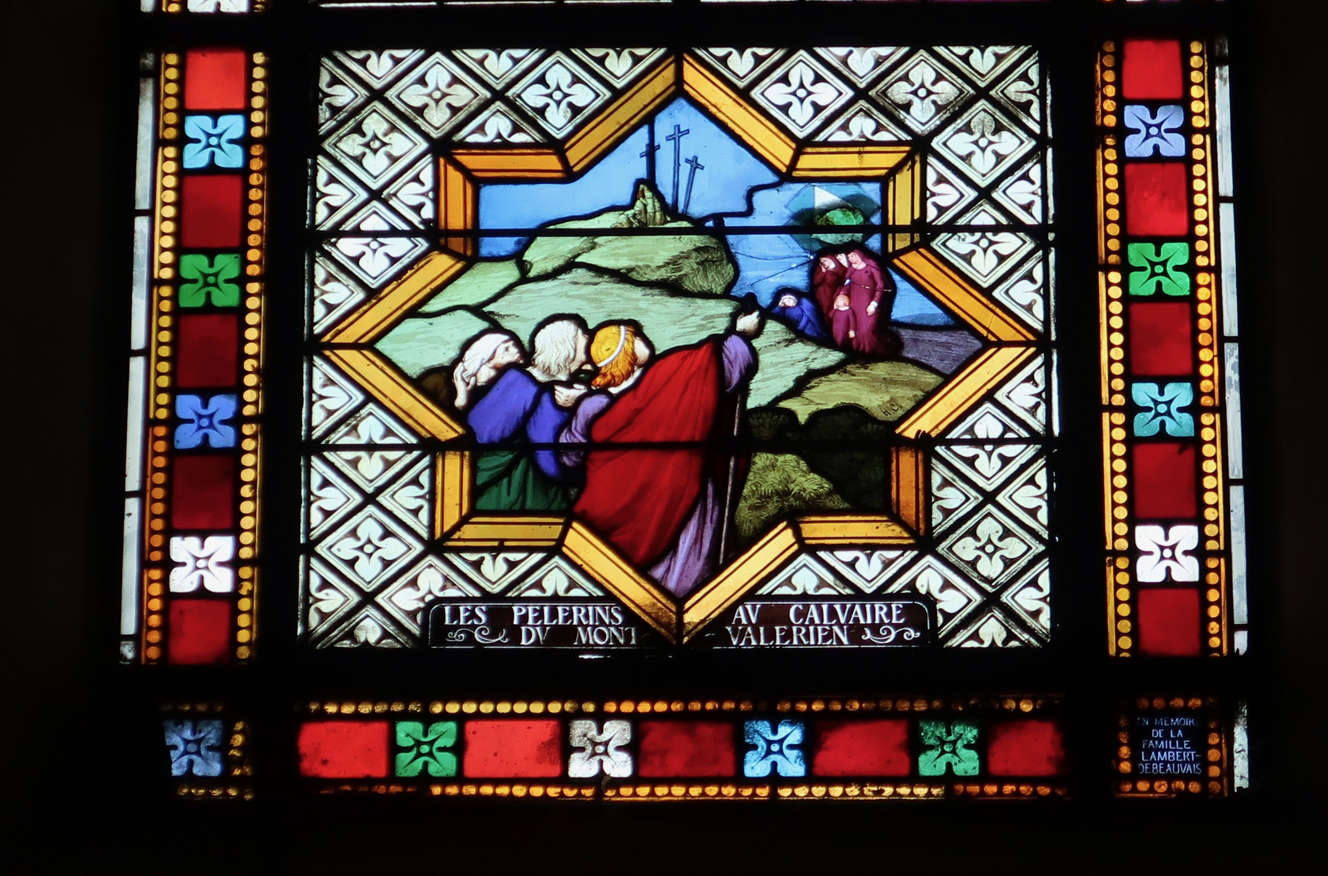 Détail d'un vitrail de l'église Cœur-Immaculé-de-Marie de Suresnes (Hauts-de-Seine) : « Les pèlerins au calvaire du mont Valérien ».